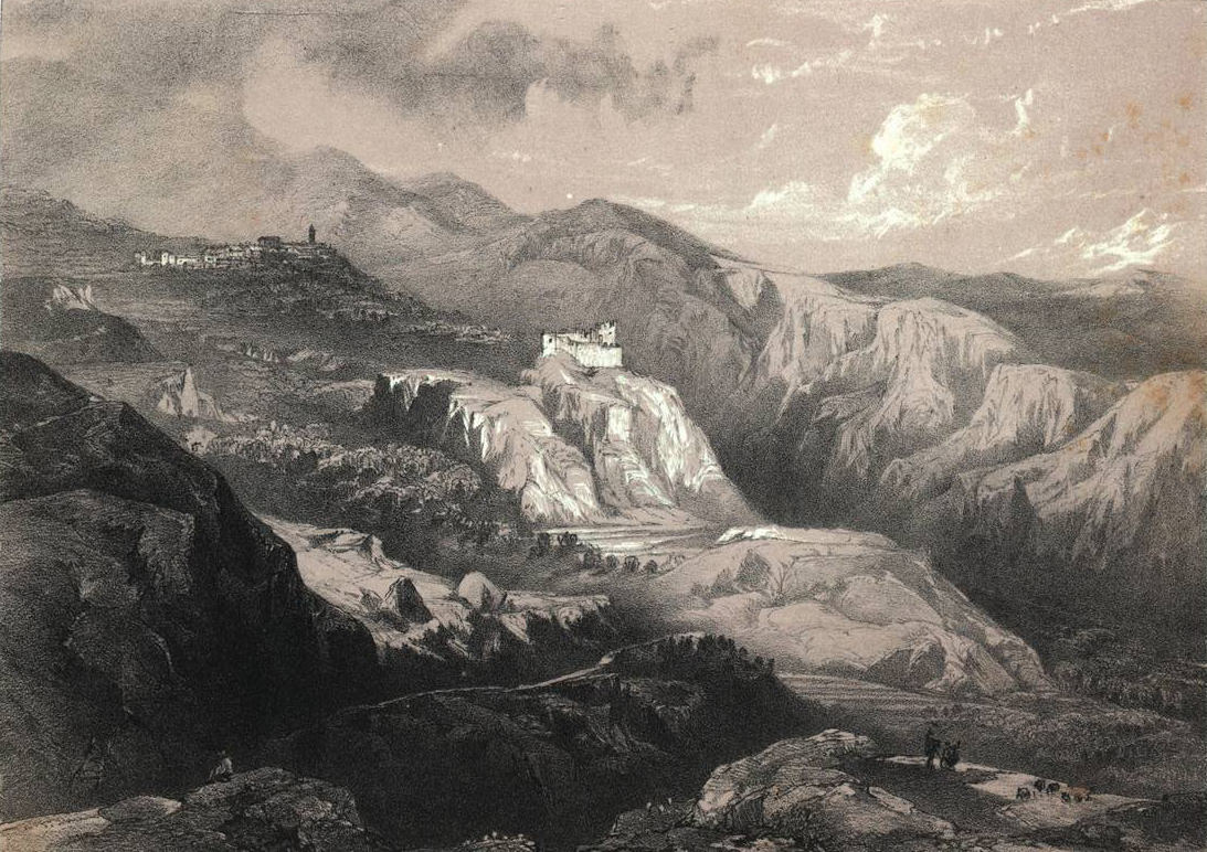 Lanjarón.